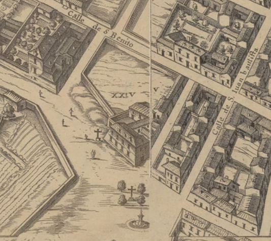 Detalle del plano de Madrid de Pedro Texeira en el que se destaca el convento de San Joaquín, vulgo de los Afligidos, así como la plazuela y fuente de los Afligidos